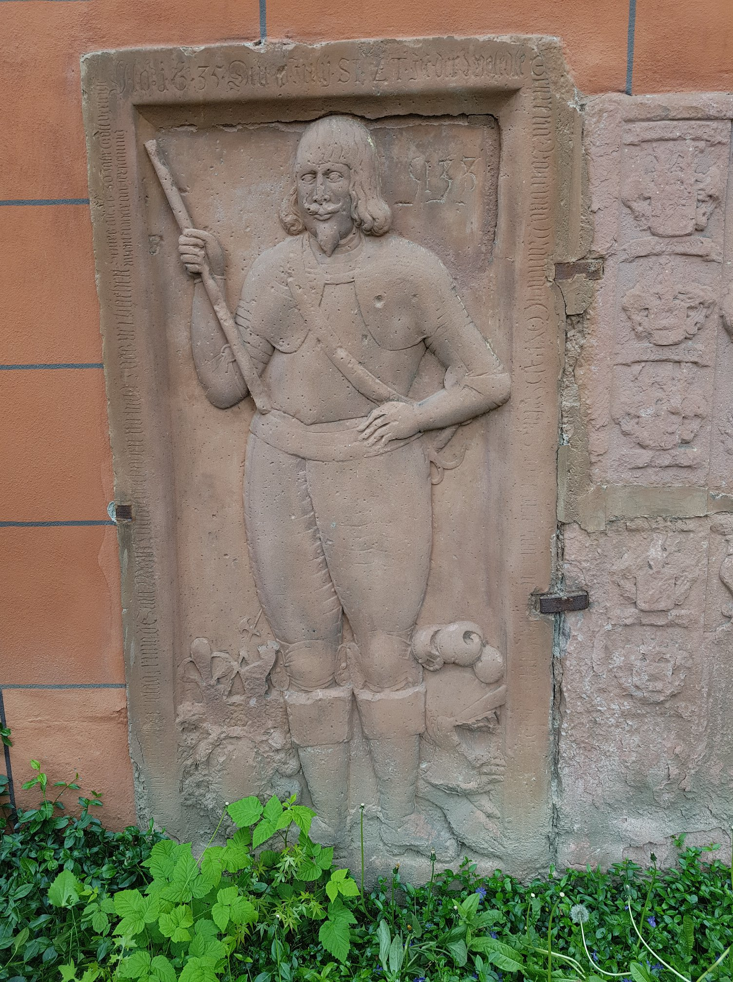 Grabstein des schwedischen Offiziers Conrad von Uexküll, eingemauert in die Außenwand der Kirche St. Quintin in Mainz.